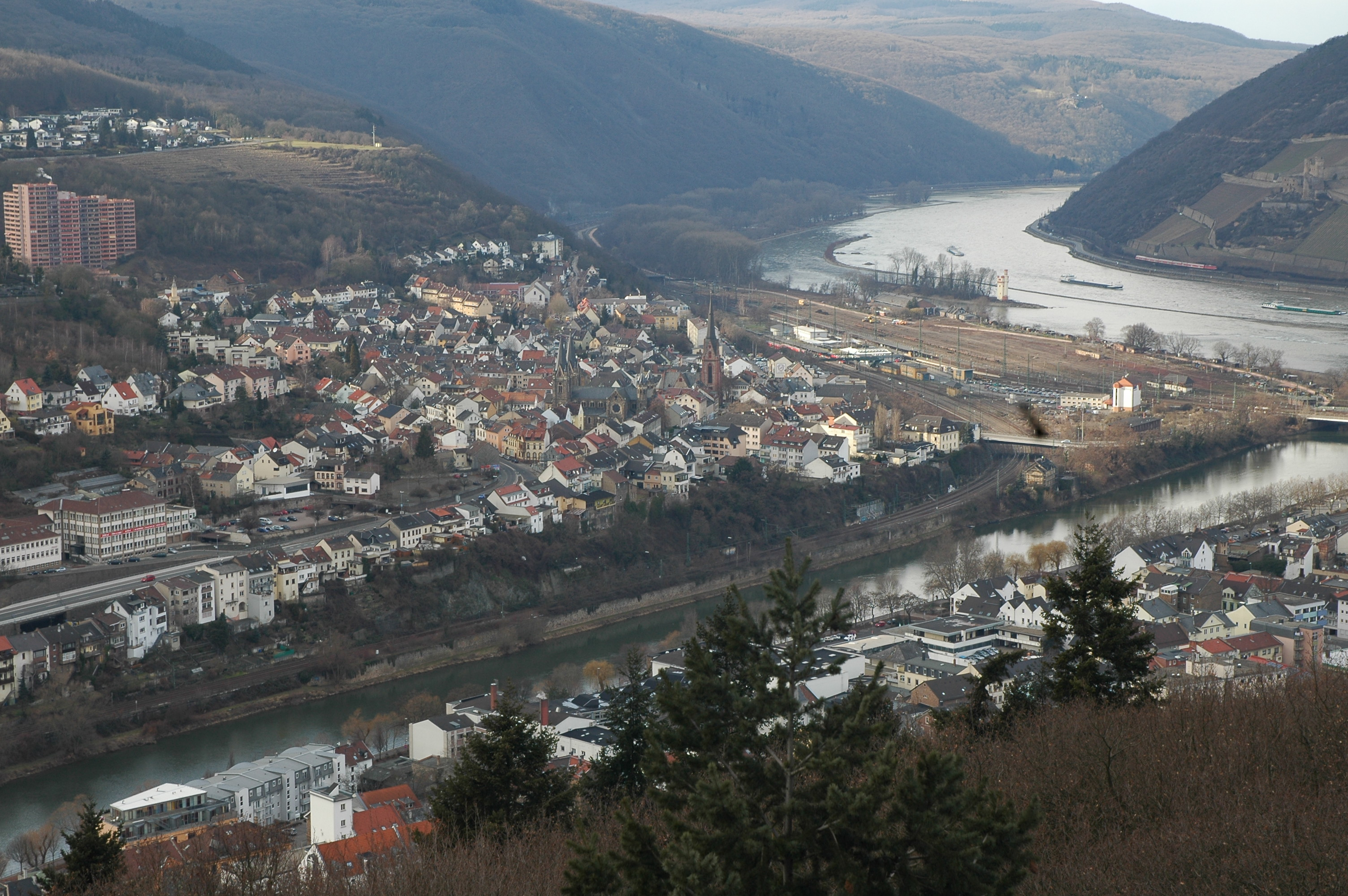 Bingerbrück